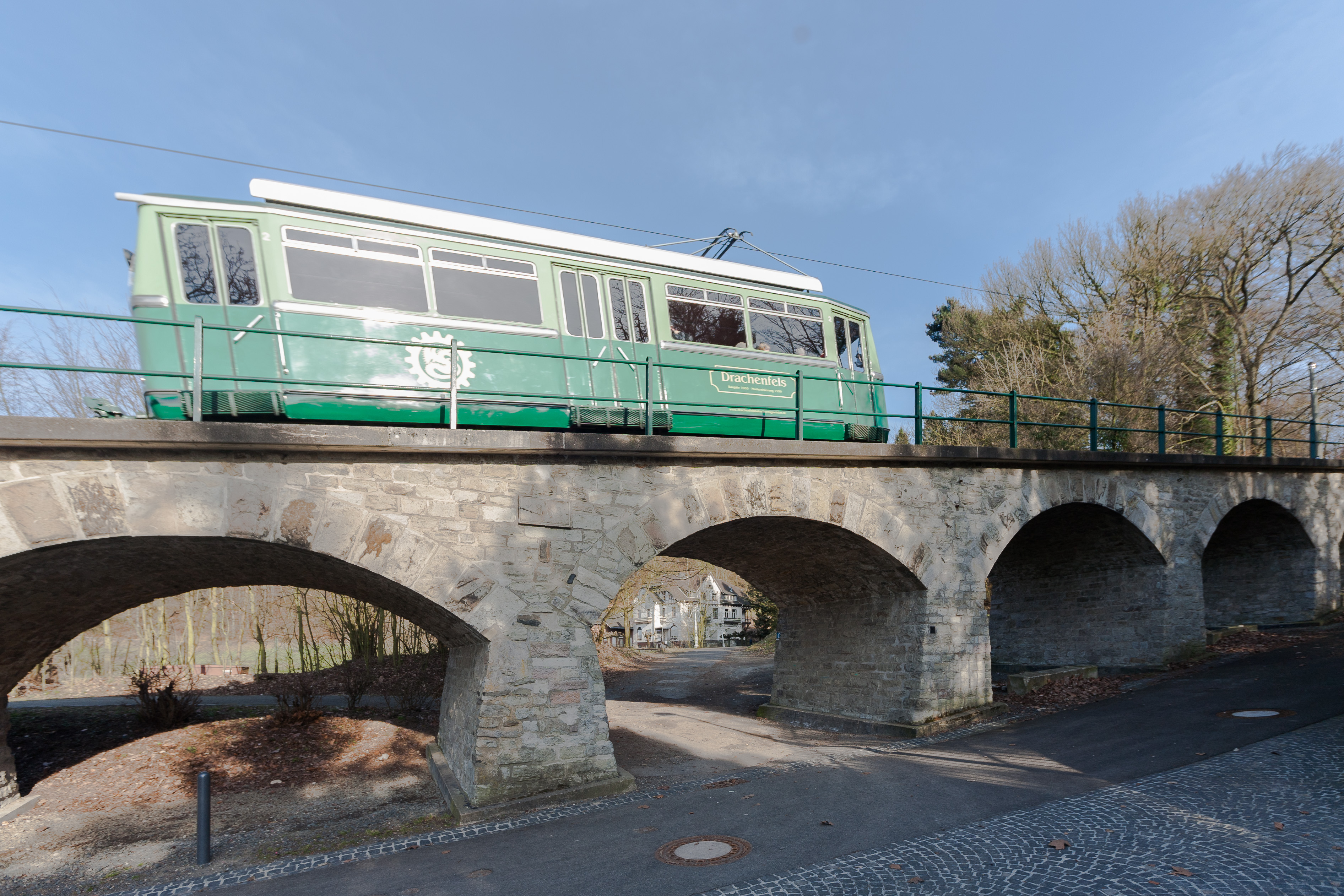 Viaduct of Drachenfels Railway at station Schloss Drachenburg, Königswinter; "Burghof" in background